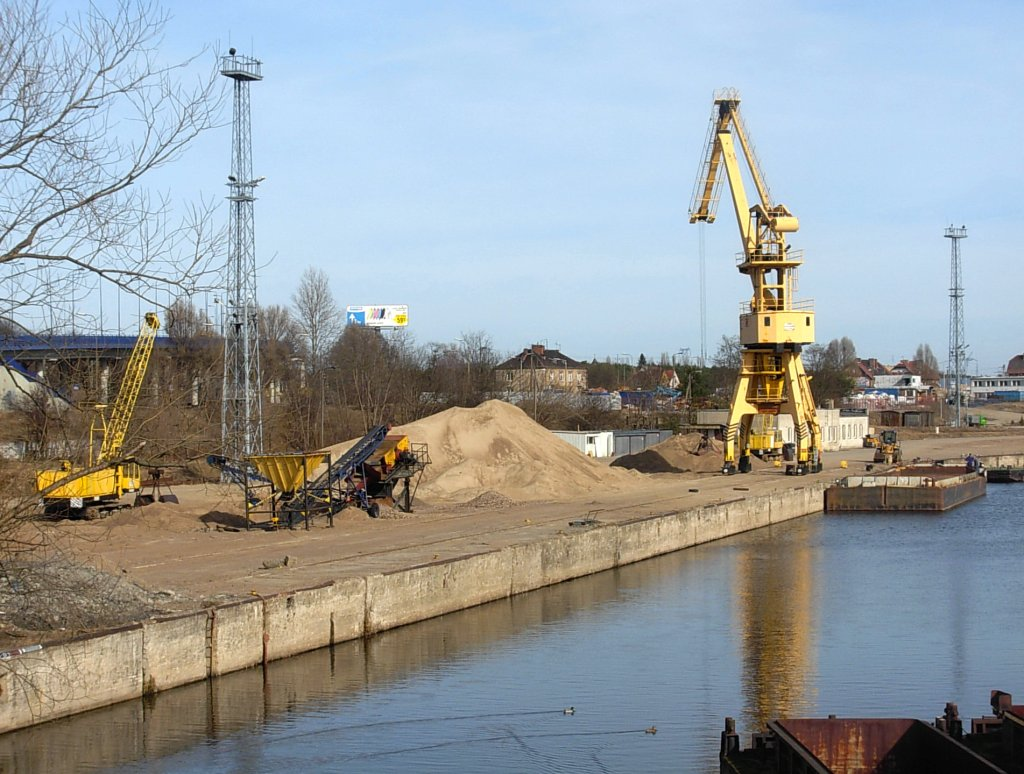 Port Żeglugi Bydgoskiej